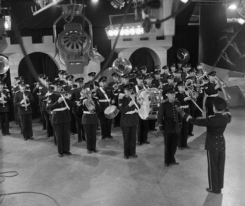 De Marinierskapel in aflevering L, M van het AVRO-programma Van A tot Z